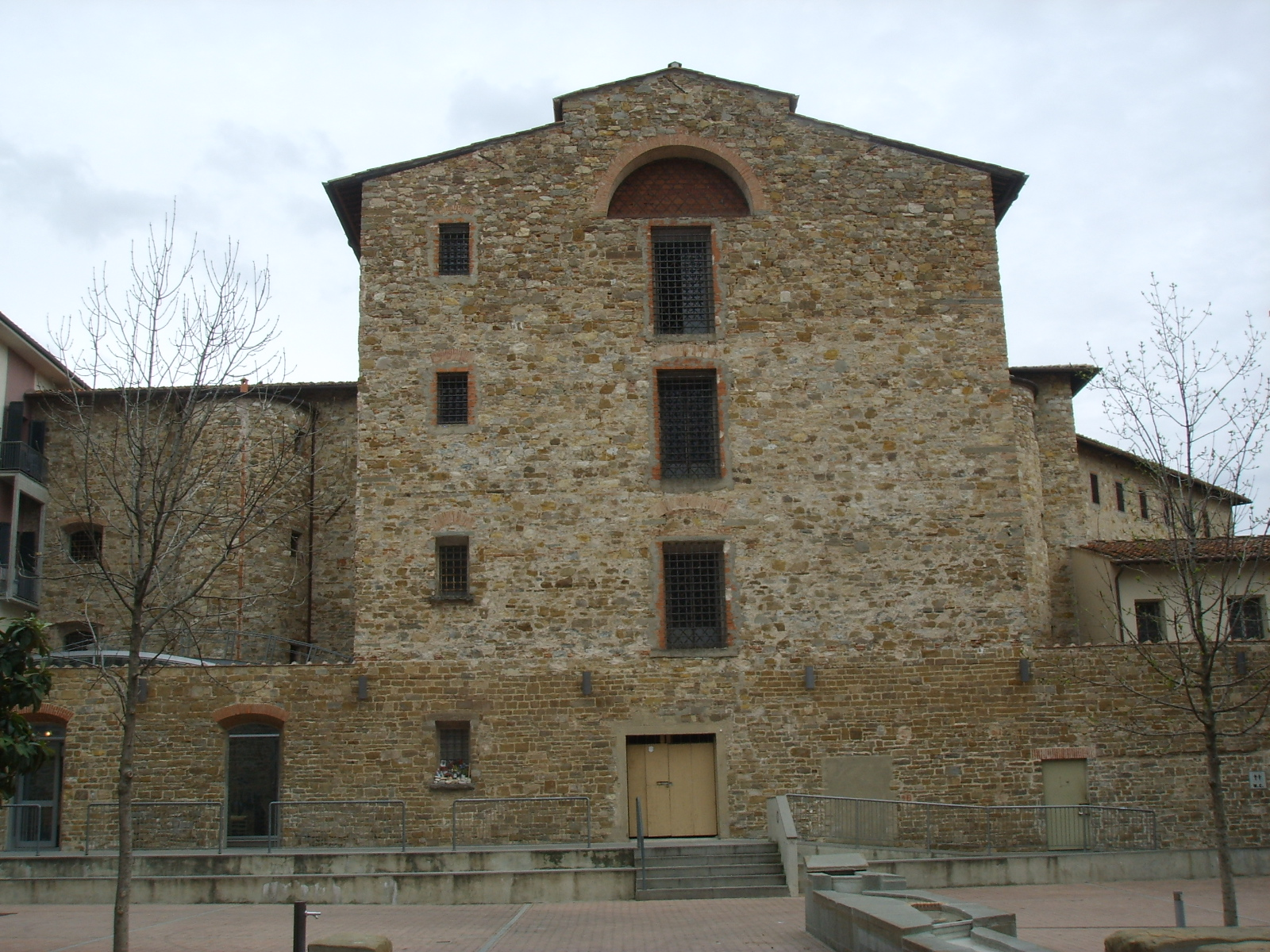 Complesso delle murate, lato ovest del panopticon carcerario